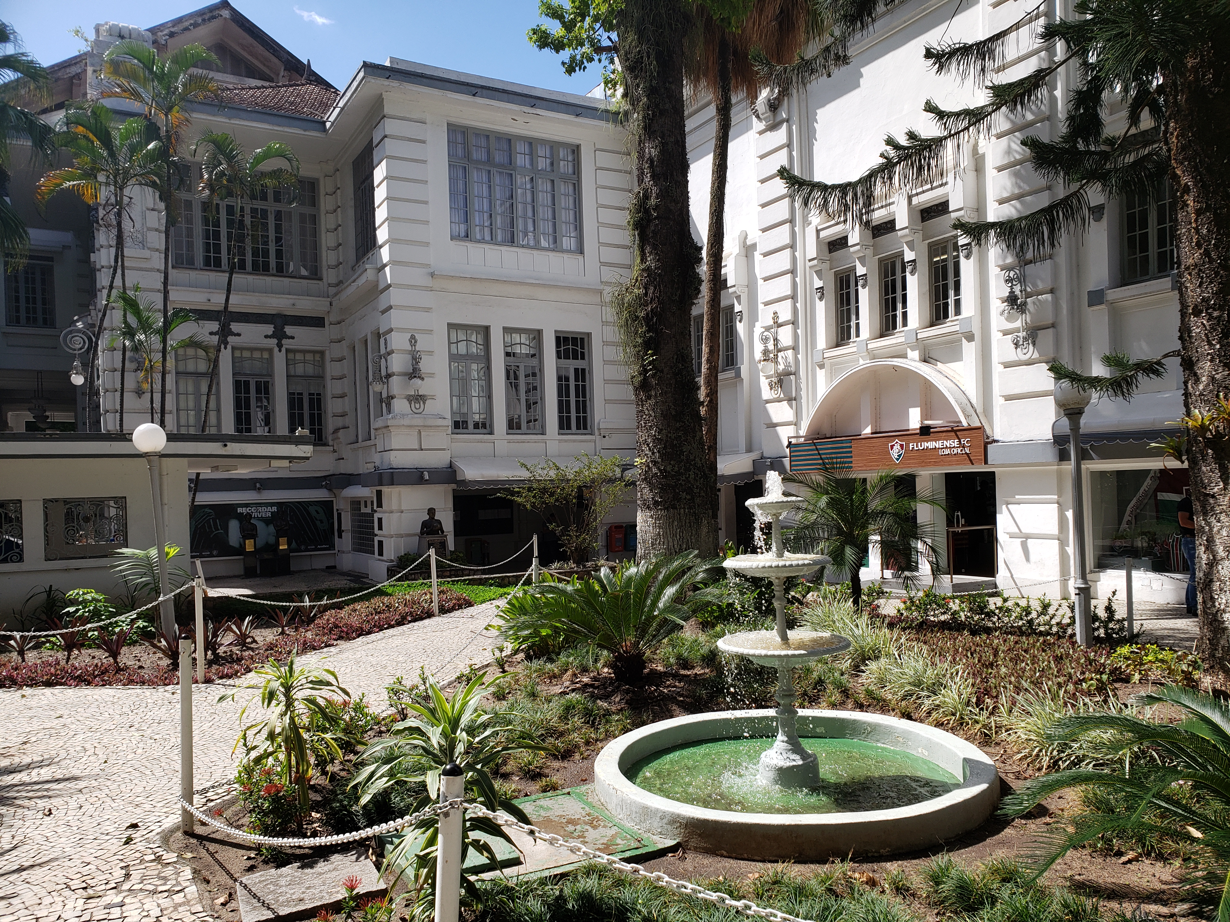 Fonte no Fluminense Football Club